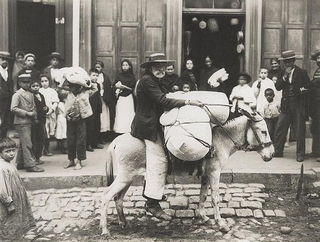 Vendedor callejero 1899